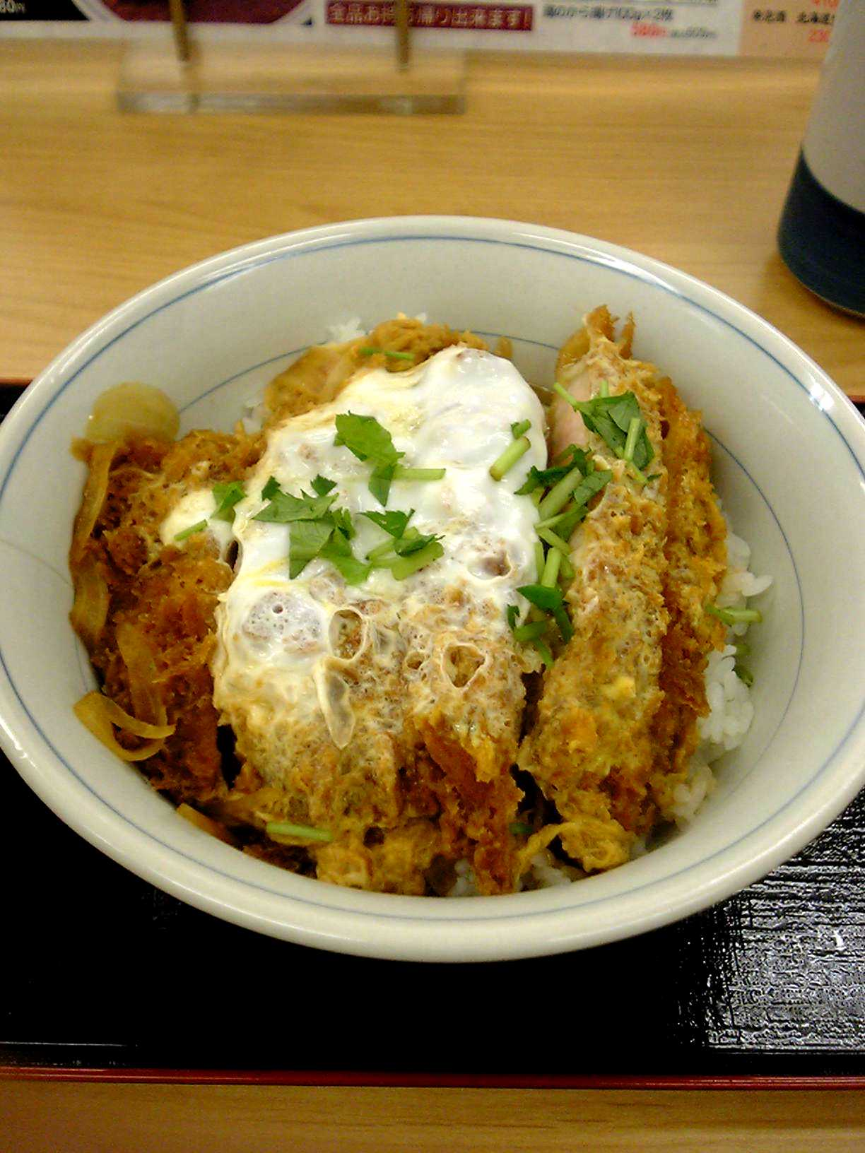 カツ丼